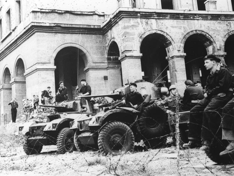 ADN-Zentralbild 27.5.1950 Englische Panzer am Potsdamer Platz